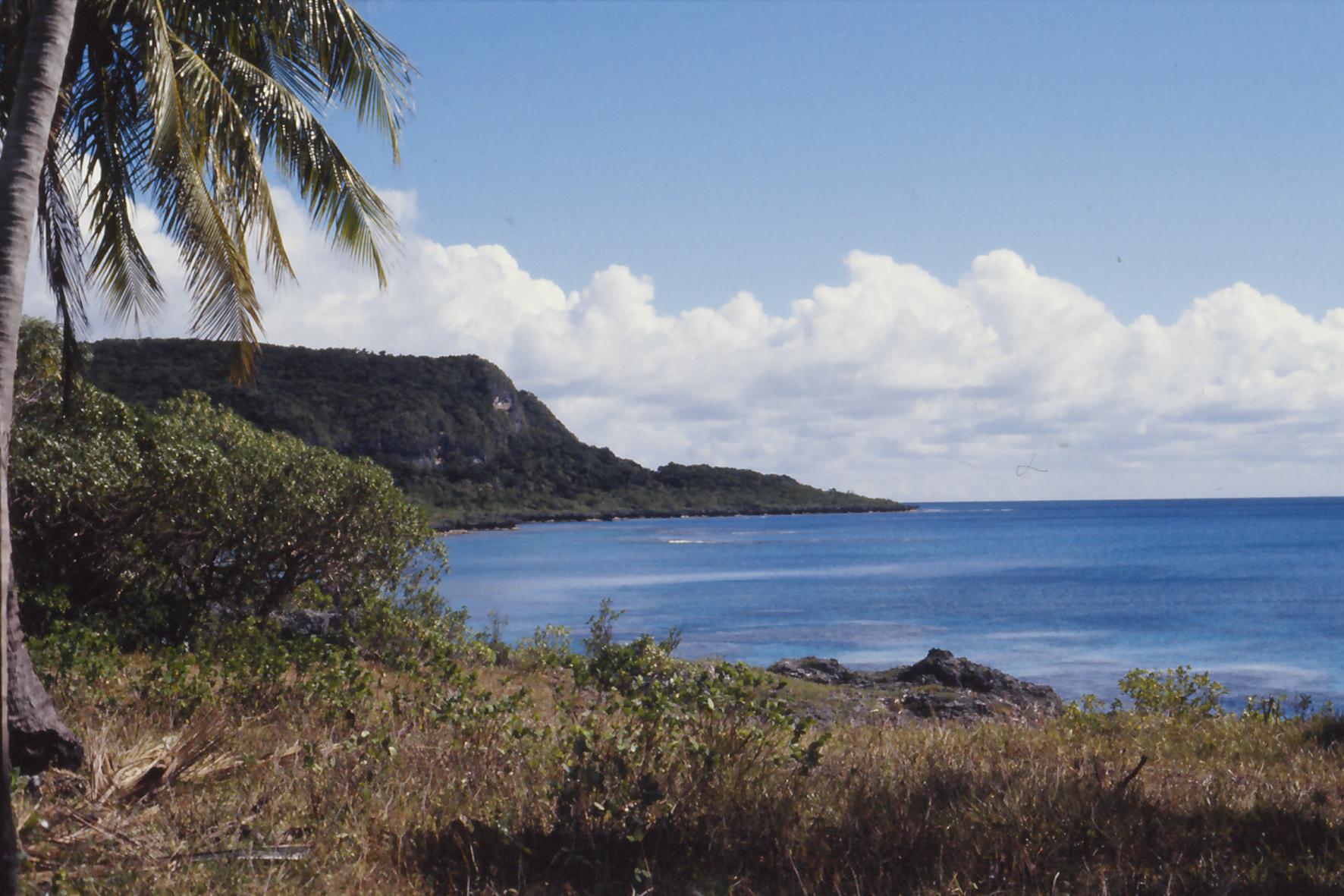 wyspa Mare, jedna z Wysp Lojalności